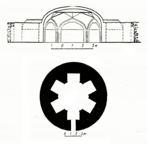 Axsadan baba türbəsinin planı və görünüşünün bərpası